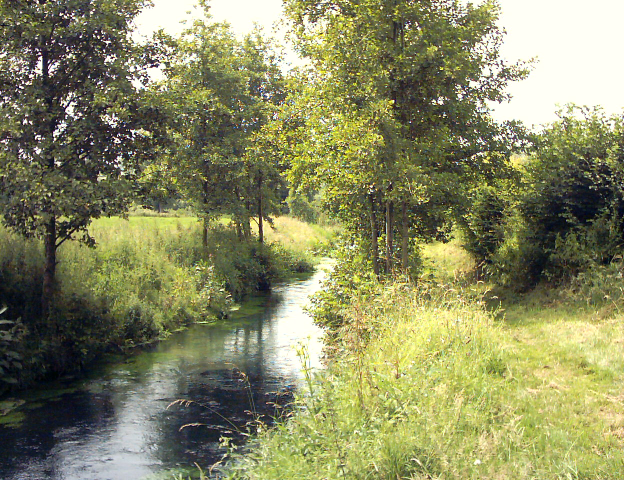 La Lys à Lugy